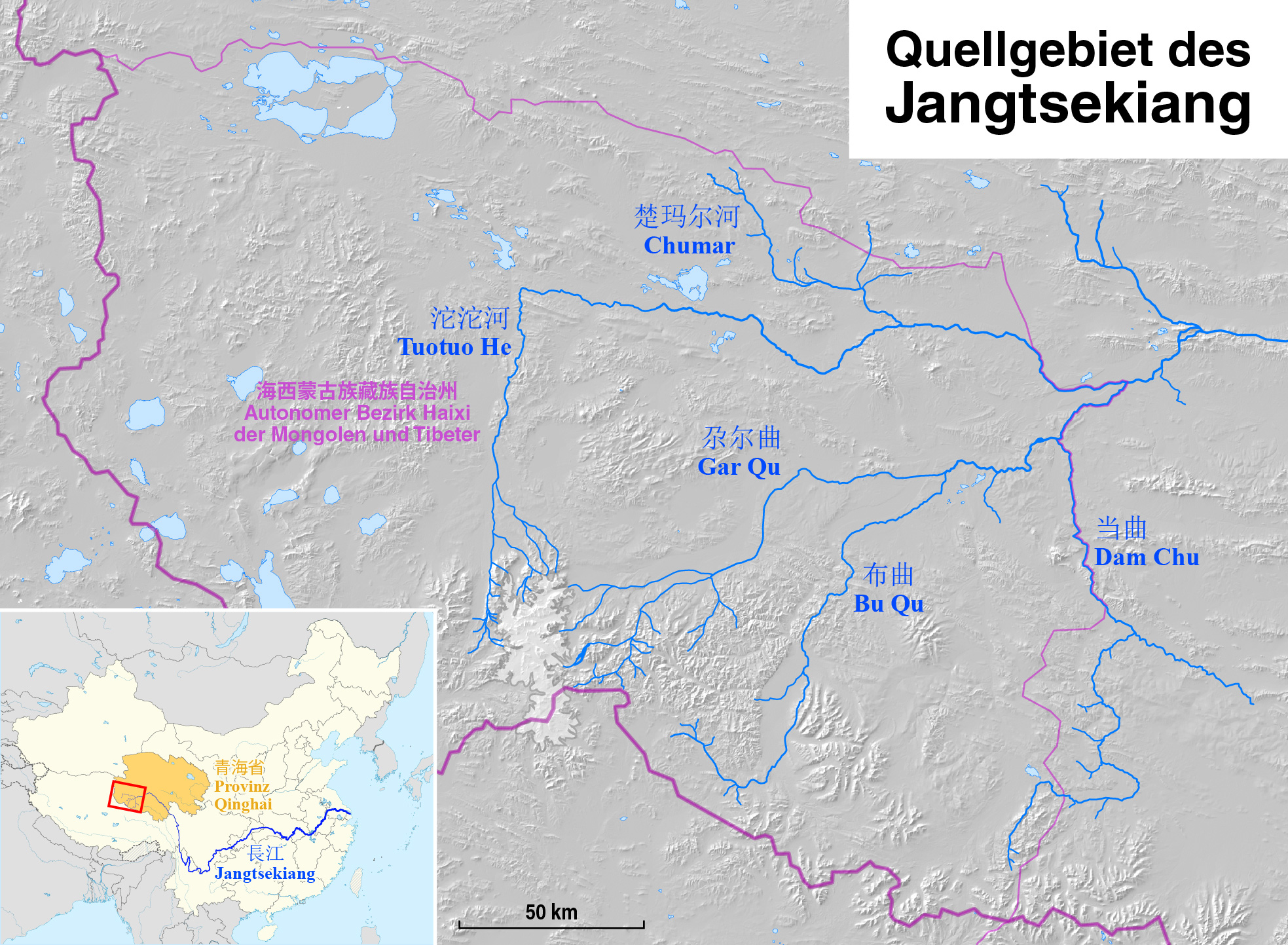 Quellgebiet des Jangtsekiang (Karte)